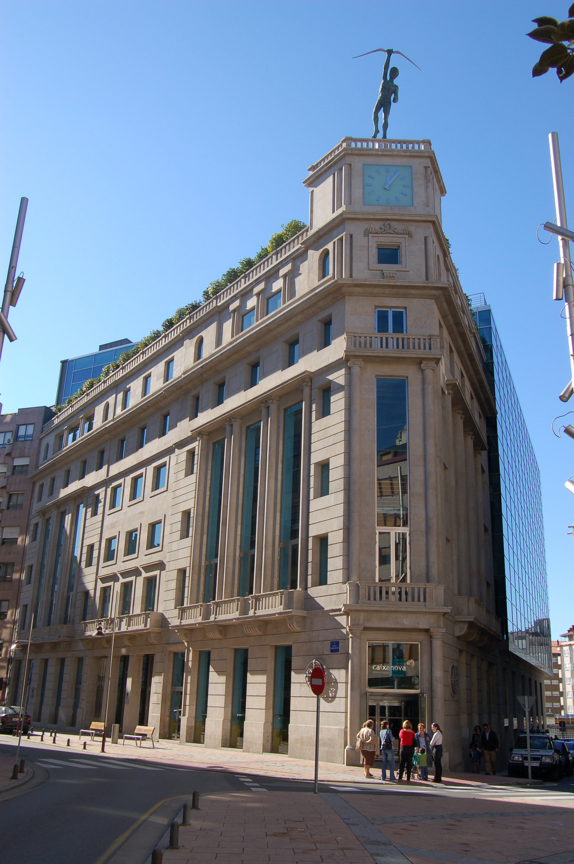 Sede de Afundación en Pontevedra, antigamente sede de Caixa de Aforros Provincial de Pontevedra